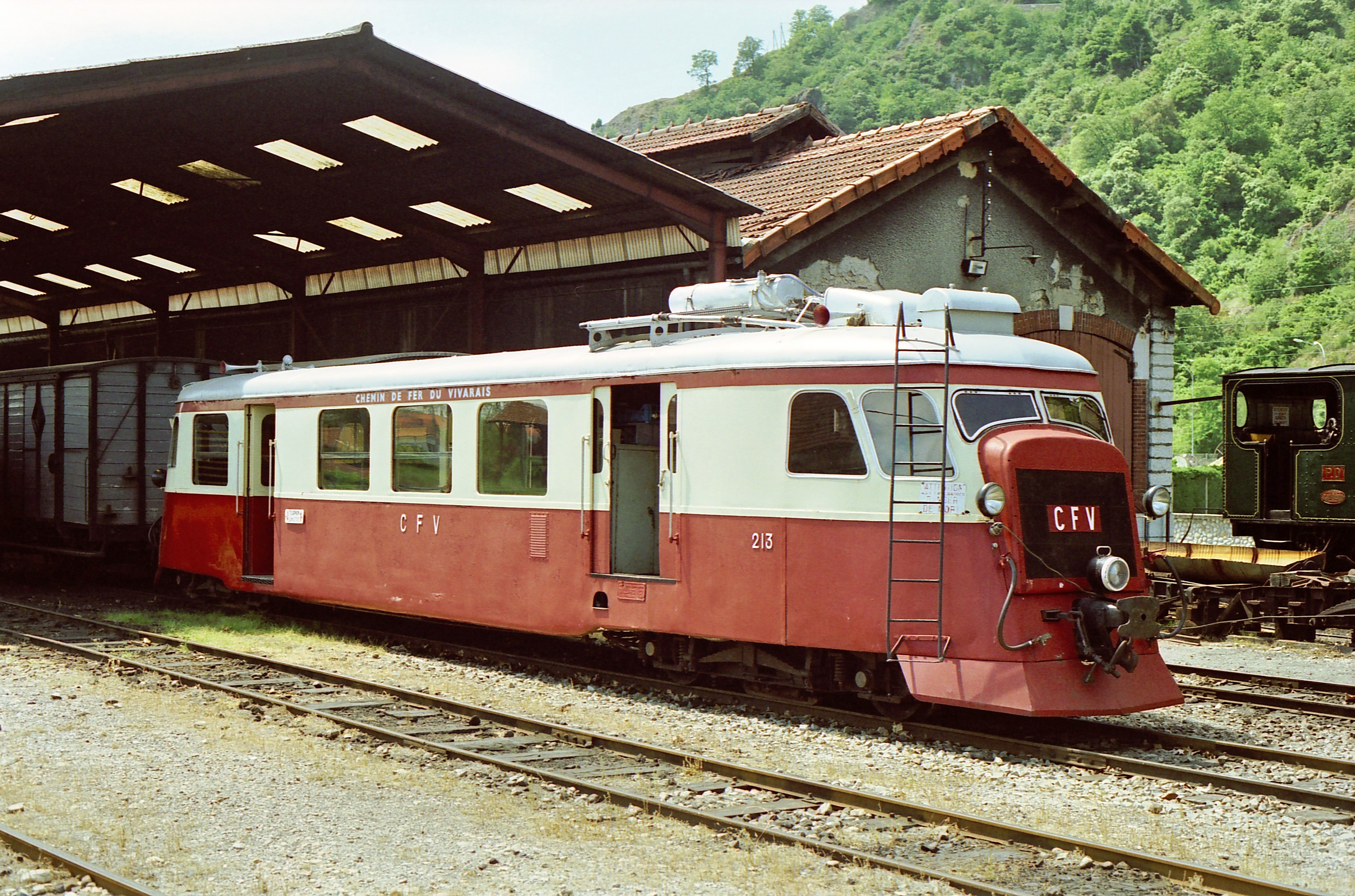 Autorail Billard 213 du Chemin de fer du Vivarais